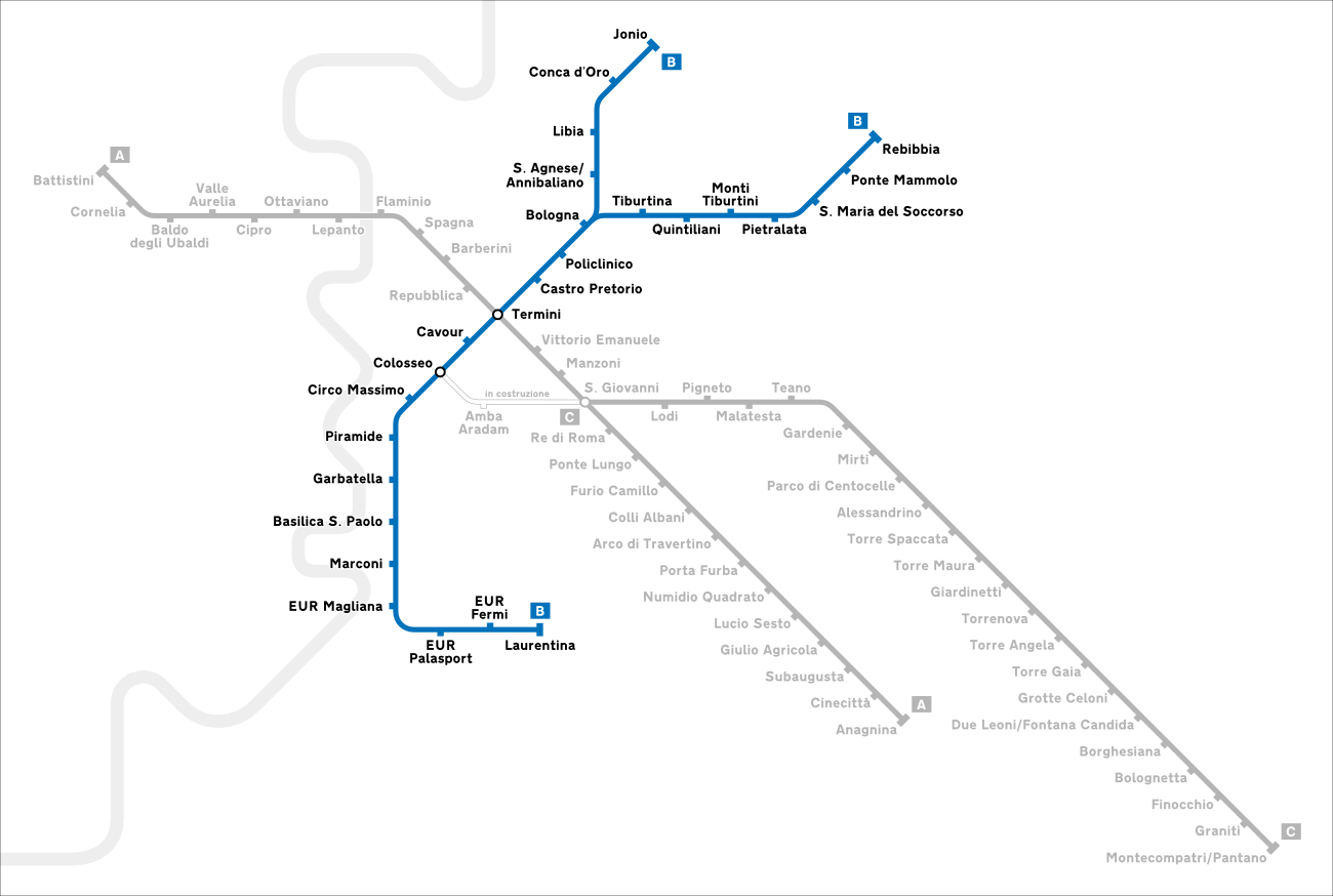 Mappa della linea B della metropolitana di Roma.